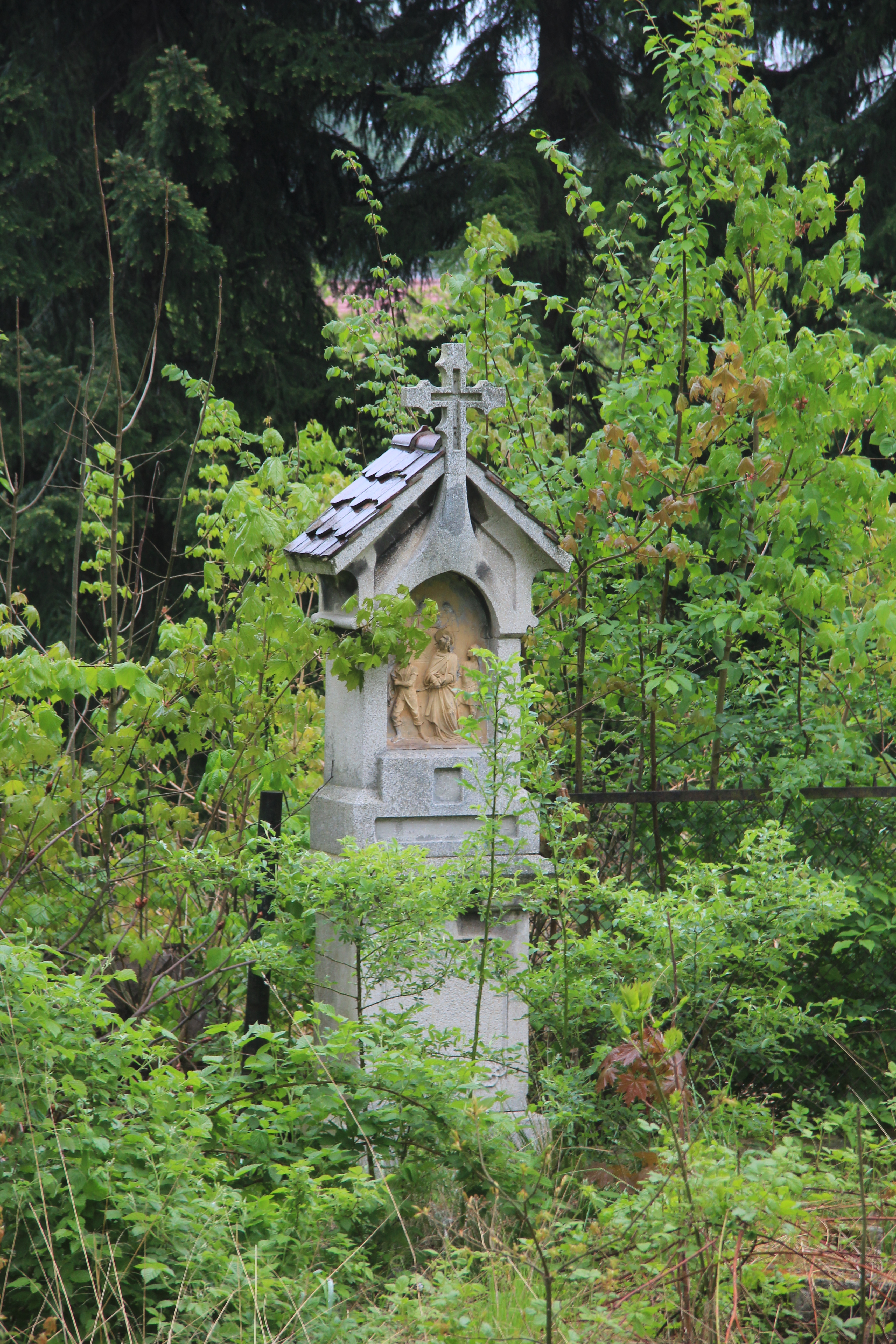 Varnsdorf, Tschechien